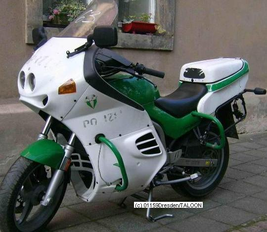 MuZ Skorpion Behördenmodell Polizei Baujahr 2002 "zivil" ersteigert